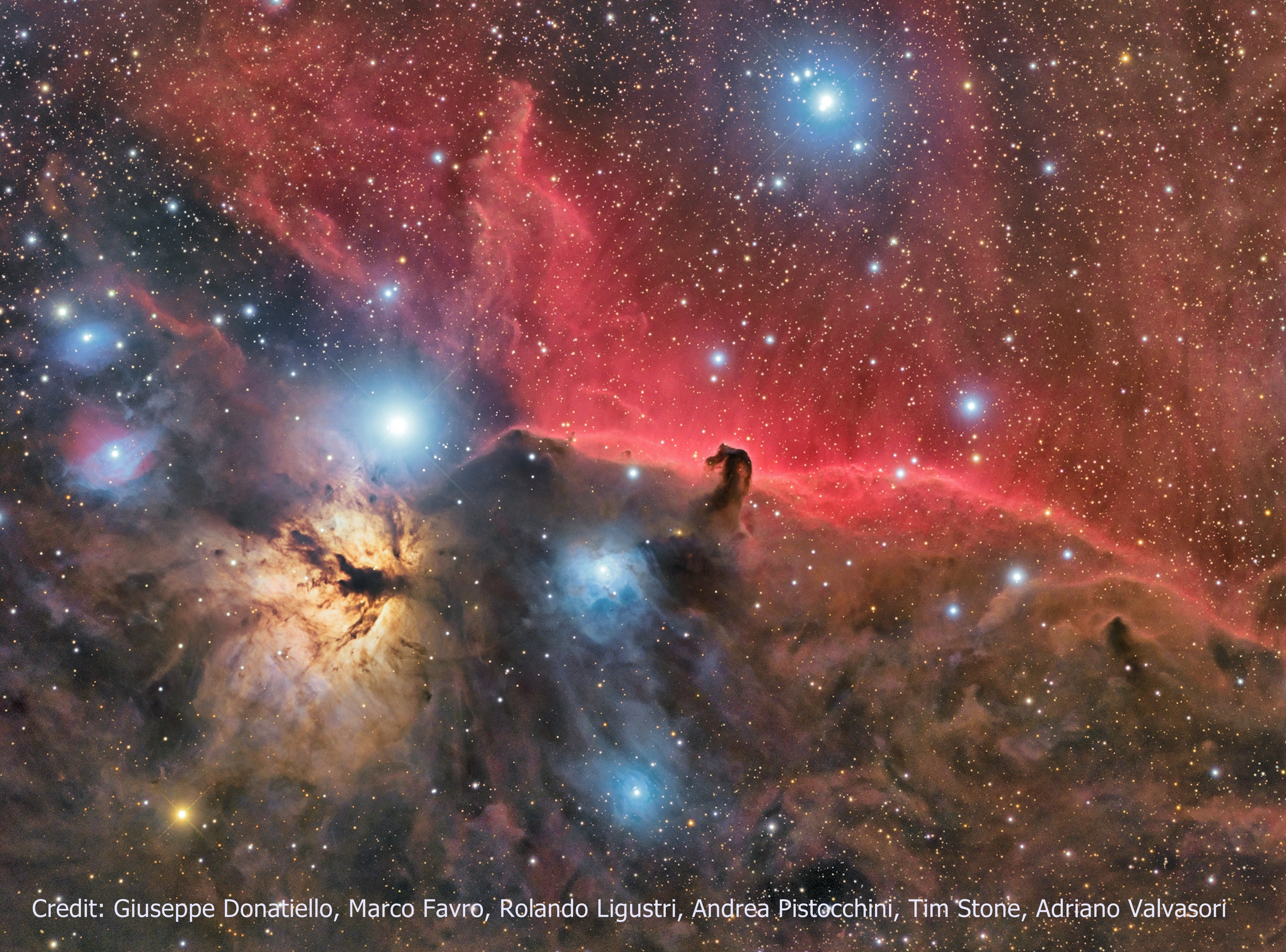 Alnitak region extended field Credit: Giuseppe Donatiello, Marco Favro, Rolando Ligustri, Andrea Pistocchini, Tim Stone, Adriano Valvasori